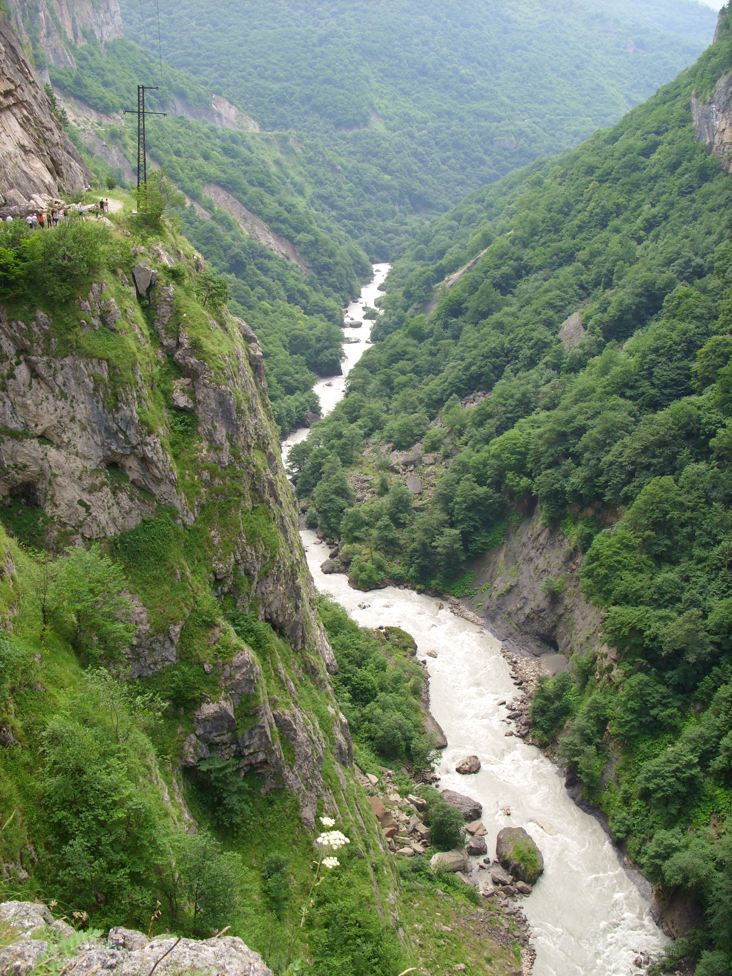 Снимки сделаны во время автобусной экскурсии из Железноводска, июль 2009 г.